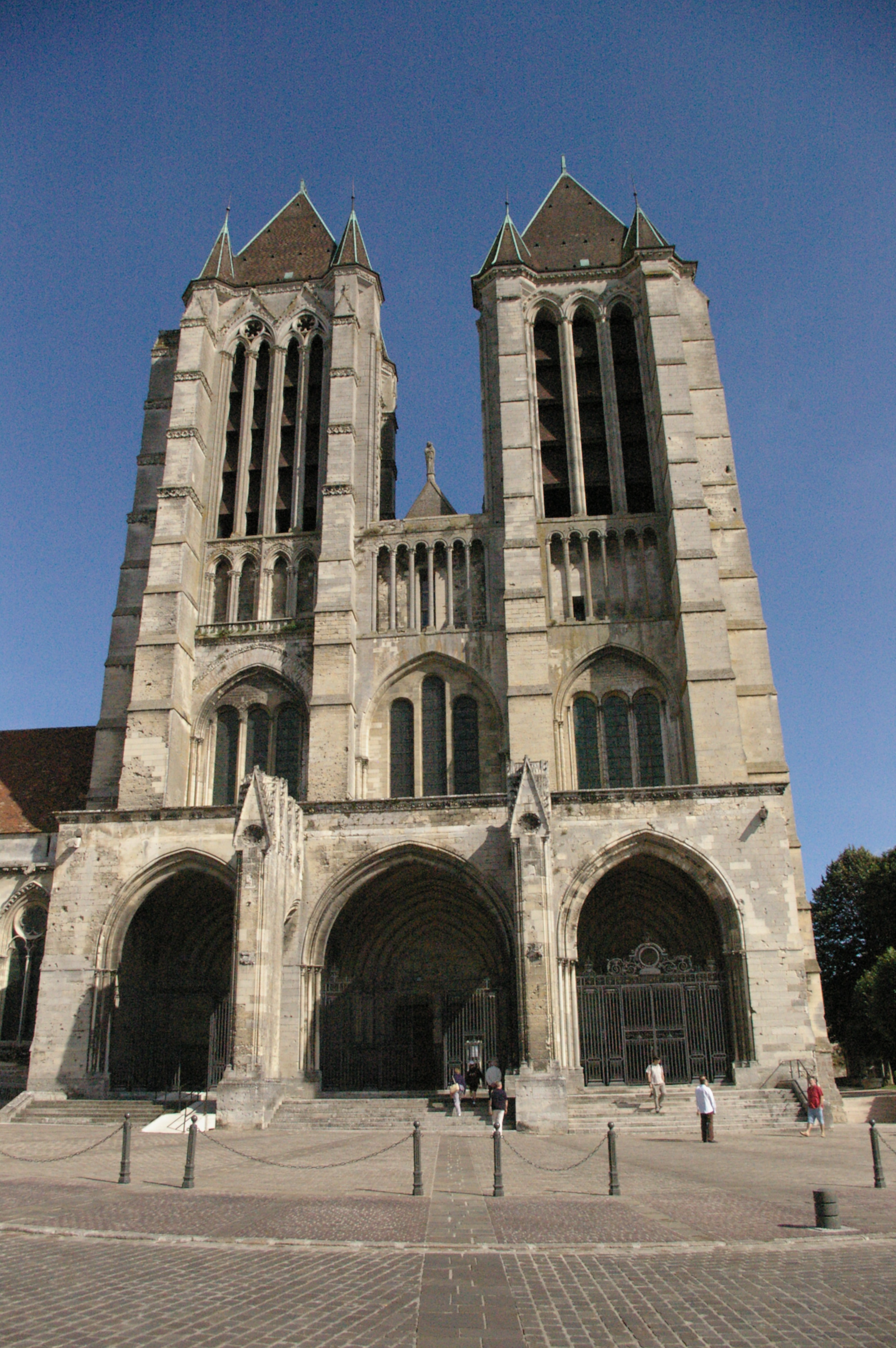 Façade de la cathédrale